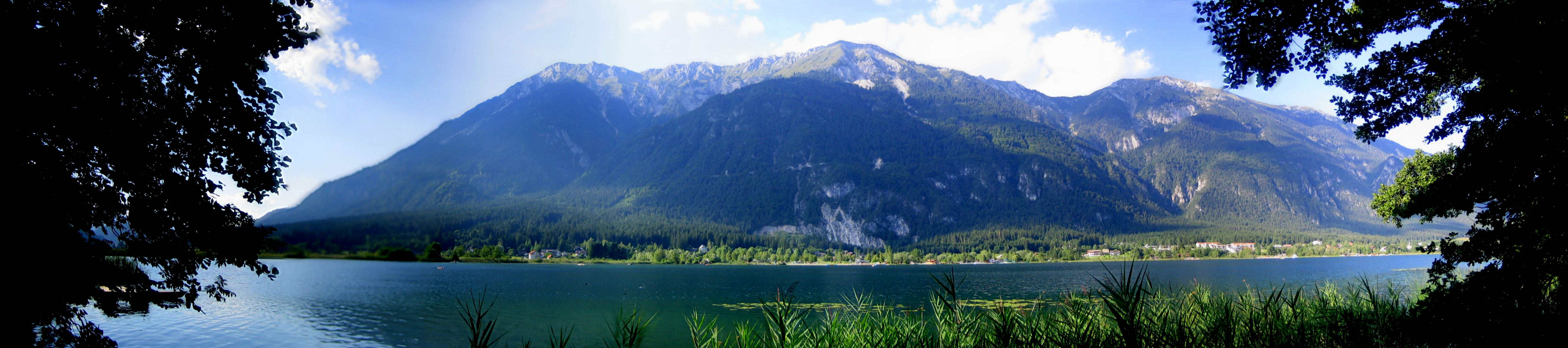 Panorama Presseggersee vom Südufer Richtung Norden